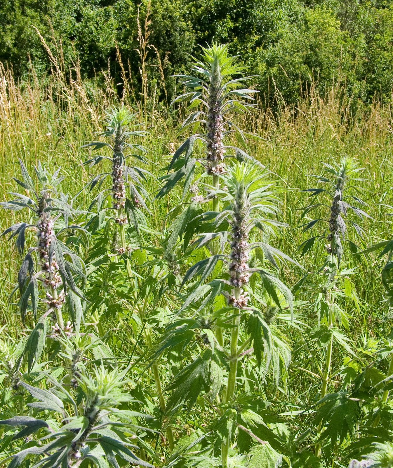 Leonurus quinquelobatus (Syn. Leonurus cardiaca subsp. villosus), Tauberland, Germany